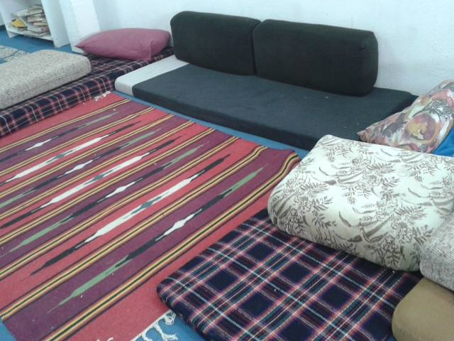 אולם הילדים